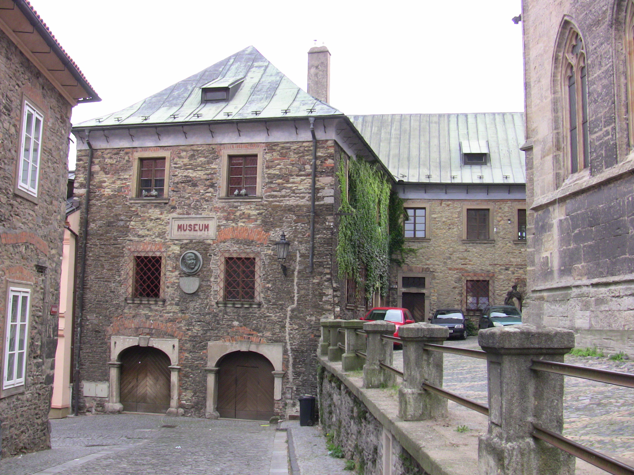 Měšťanský dům Parléřova 35, Kolín